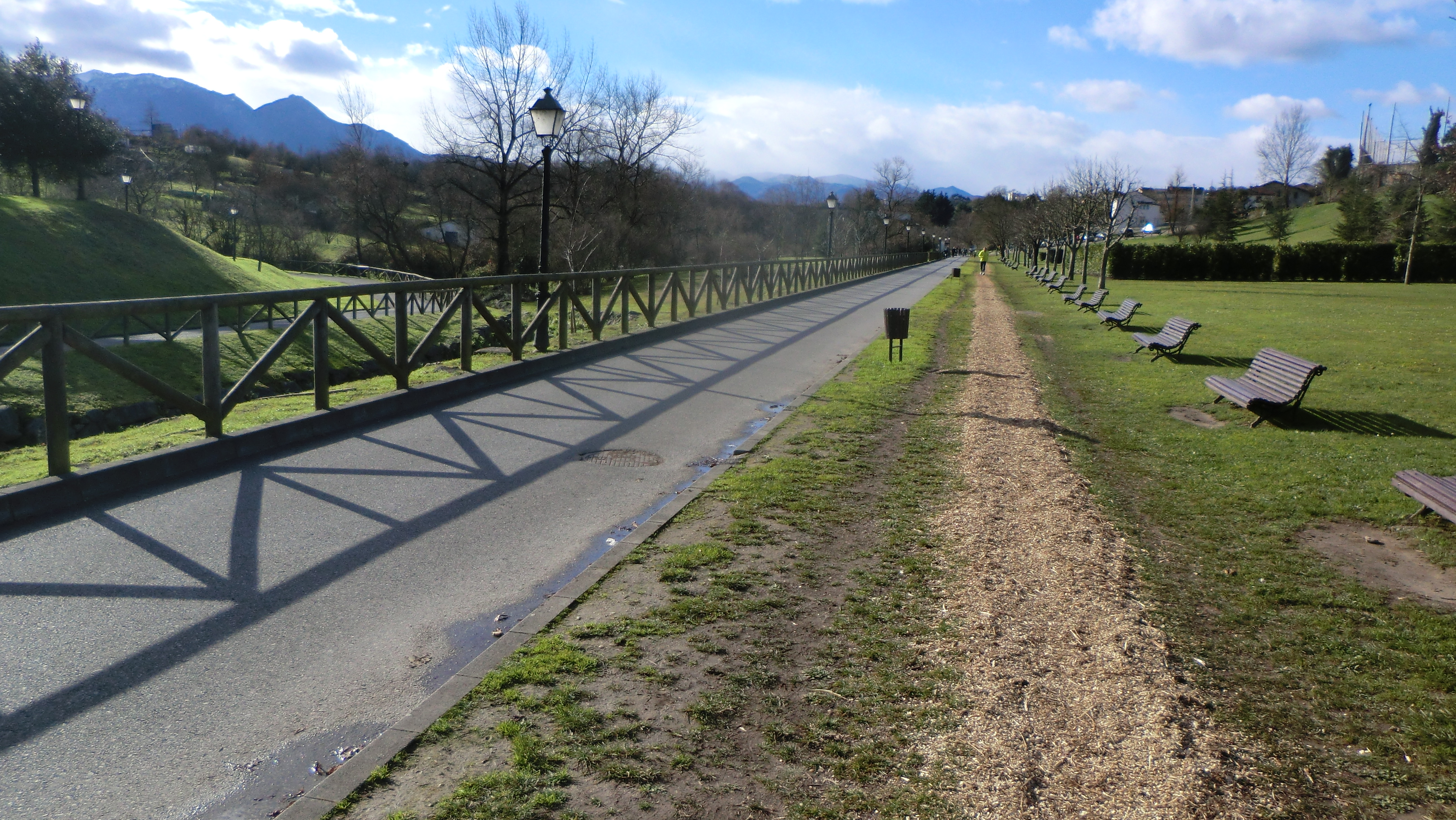 Zentraler Wanderweg im Parque de Invierno